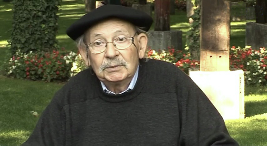 Una exuberante huerta al aire libre junto al río Eresma es el lugar donde el artista vasco Agustín Ibarrola ha trasladado estos días su mundo escultórico. Monumentales piezas de hierro y una treintena de traviesas de ferrocarril de madera conforman la muestra 'Ibarrola en libertad' en el marco del Hay Festival Segovia.